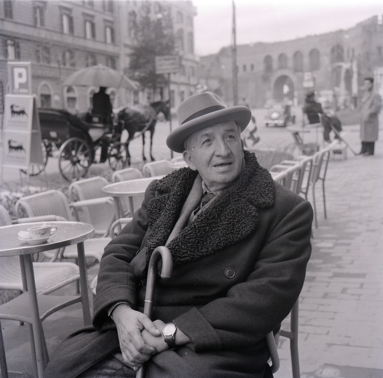 Servizio fotografico : Italia, 1957 / Paolo Monti. - Buste: 6, Fototipi: 6 : Negativo b/n, gelatina bromuro d'argento/ pellicola ; 6x6. - ((Serie costituita da 6 buste di cartaidentificate con i nn.: 10201, 10202, 10203, 10204, 10205, 10205bis. - Fonte: Agenda di Paolo Monti: Monti/ 2/ 6 giugno 1964 - 31b marzo 1966/ 8194-12420 (1964-1966), presso Archivio Paolo Monti